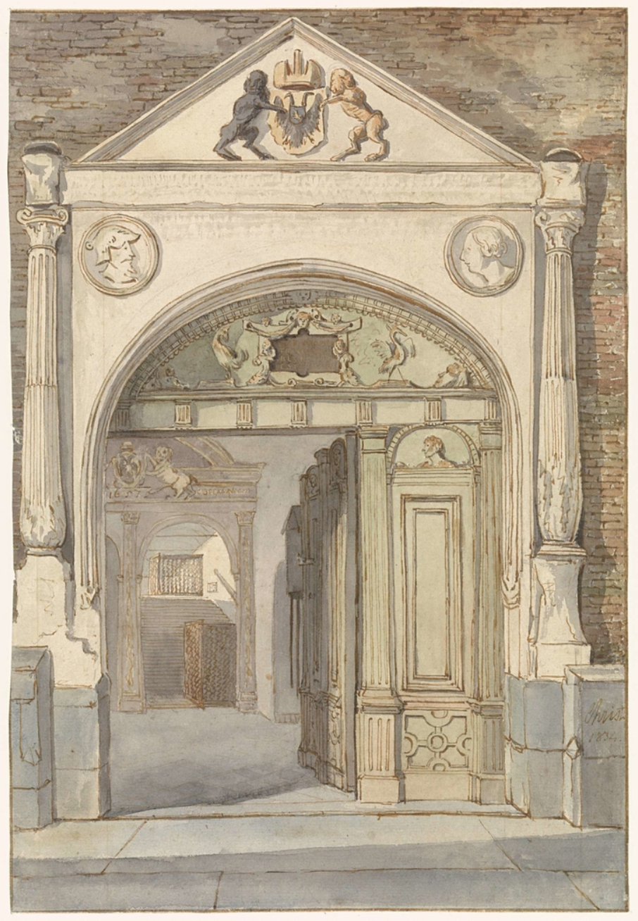 Gezicht in de hal van het stadhuis te Nijmegen